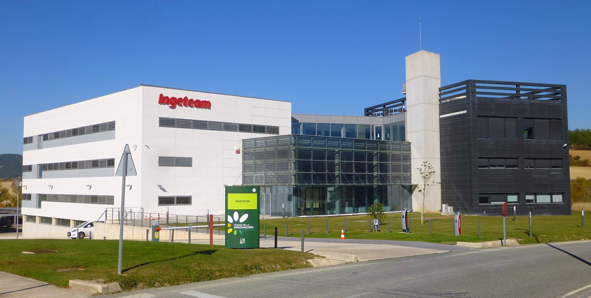 Sarriguren (Egüés) - Parque de la Innovación de Navarra-Enclave Energía y Medio Ambiente - Ingeteam Energy